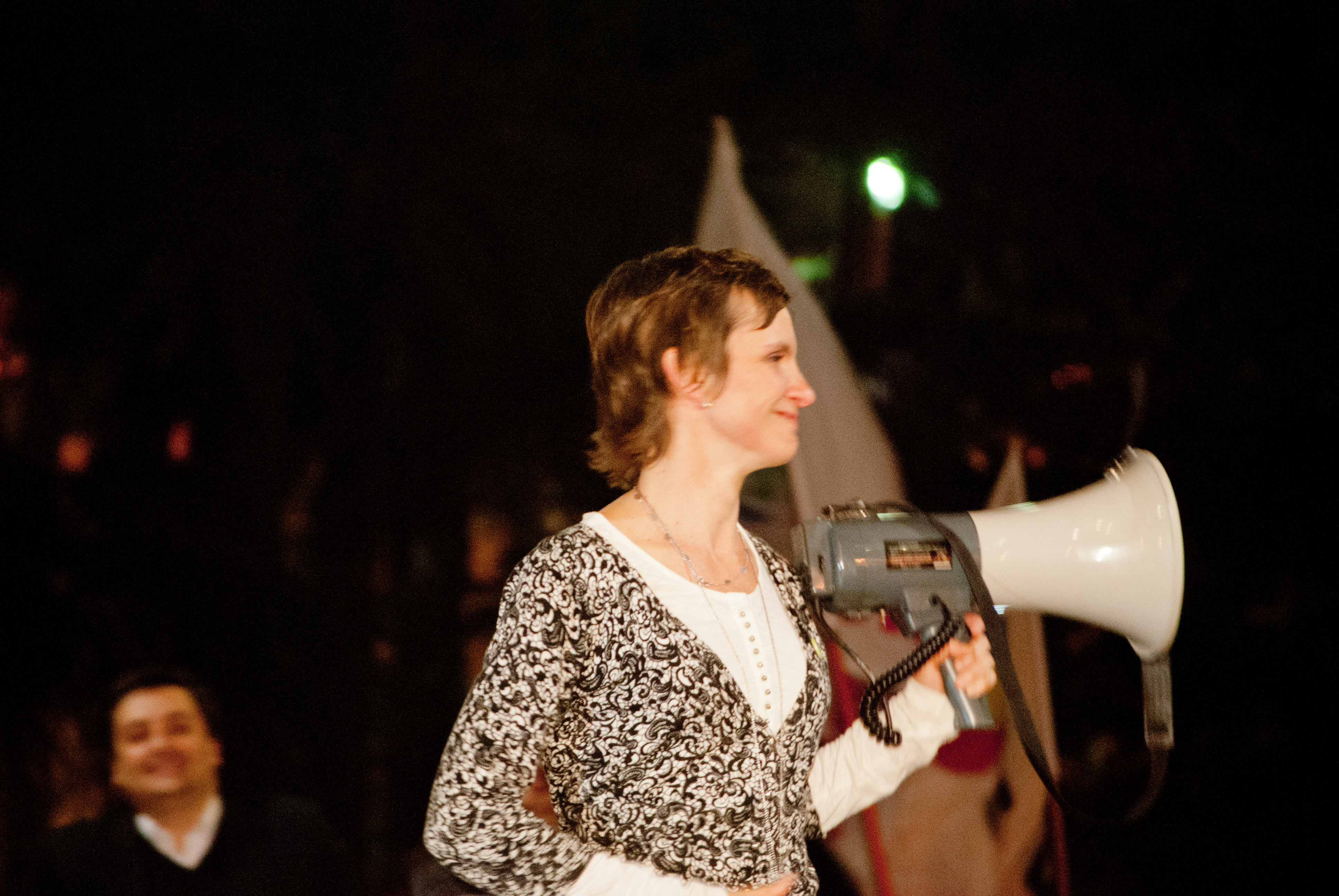 Carolina Tohá, alcaldesa electa de Santiago, celebrando su victoria en la elección municipal.